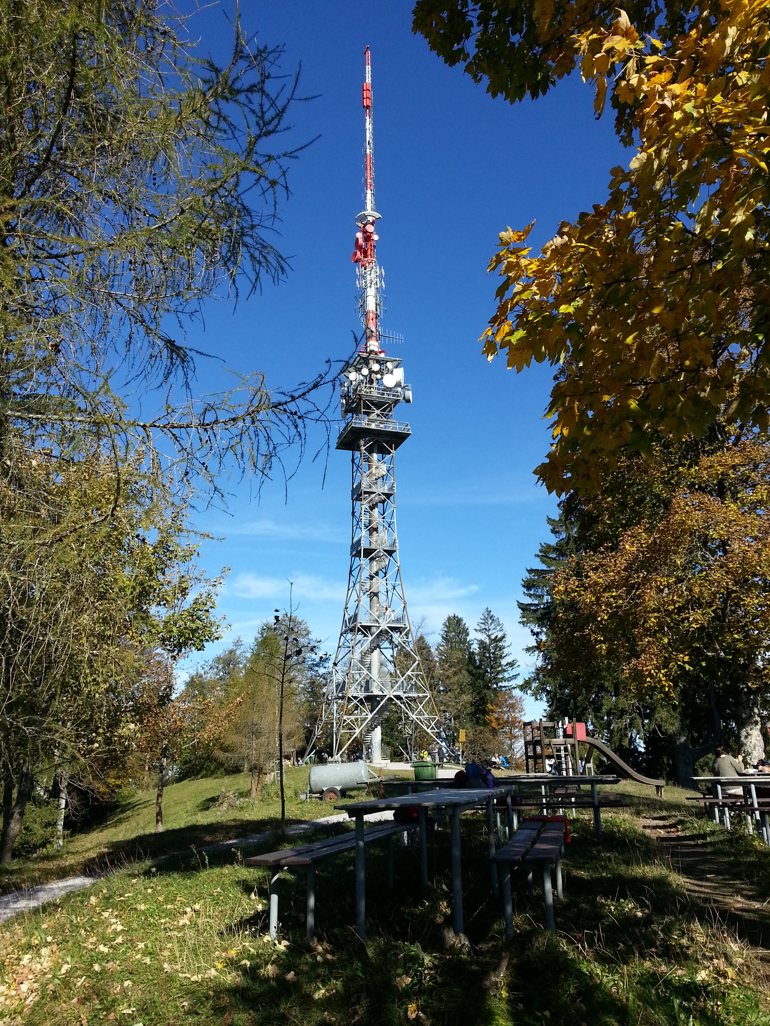 Bachtelturm, Hinwil